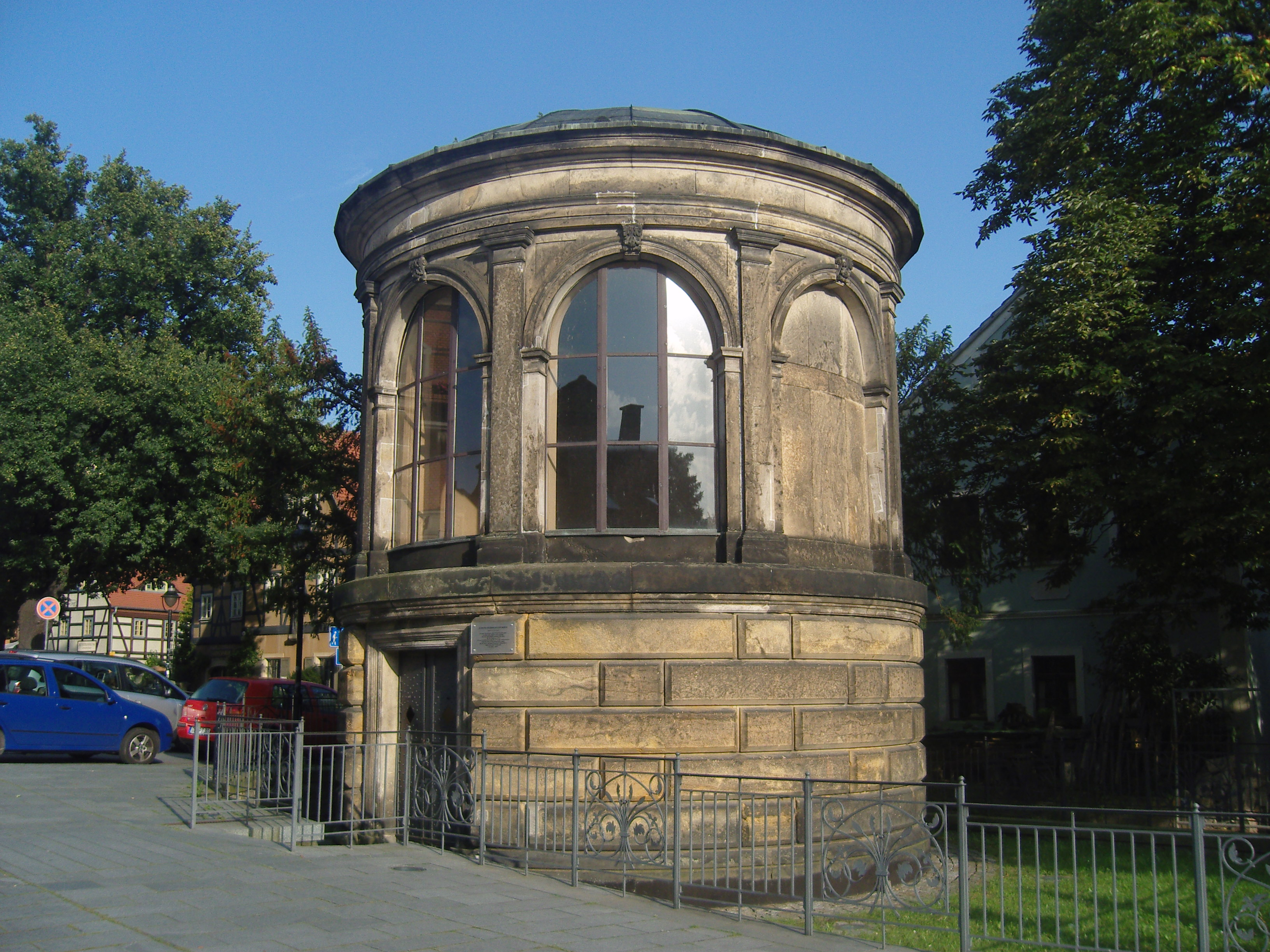 Denkmalgeschütztes Joseph-Herrmann-Denkmal in der Friedrich-Wieck-Straße in Dresden